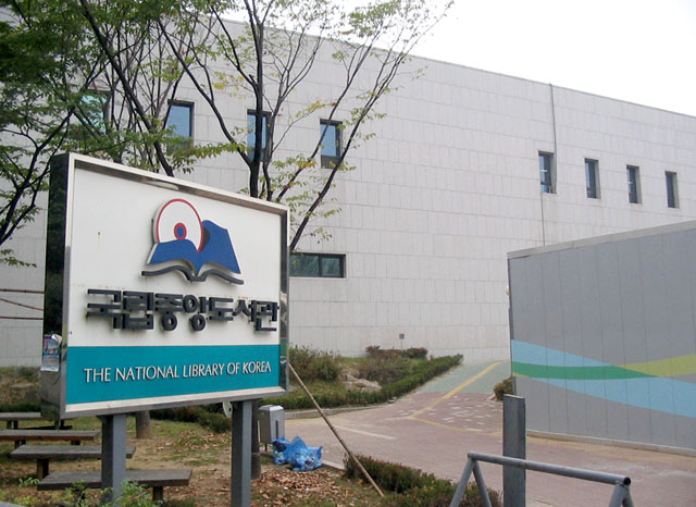 국립중앙도서관. 2006년 10월에 촬영. 화면 오른쪽은 공사 중이어서 가려져 있다.